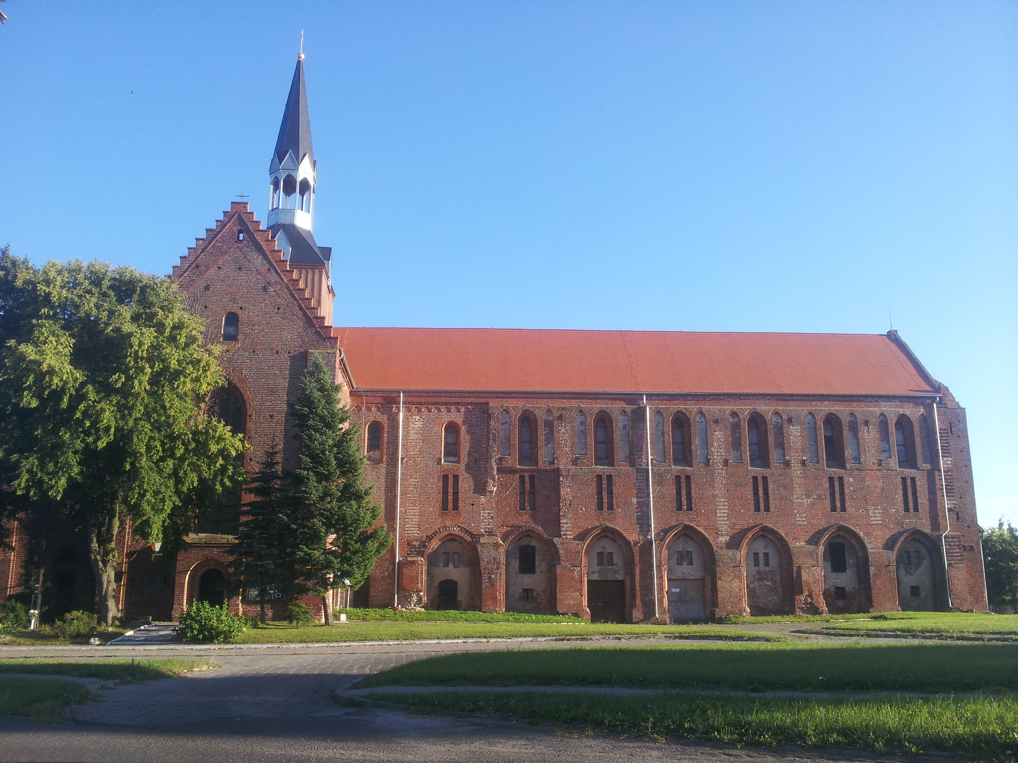 Kołbacz - dawny kościół cysterski w zespole klasztornym cystersów, przejściowo magazyn zbożowy, obecnie rzymskokatolicki kościół parafialny p.w. Najświętszego Serca Pana Jezusa, 1210-XIV, XVI